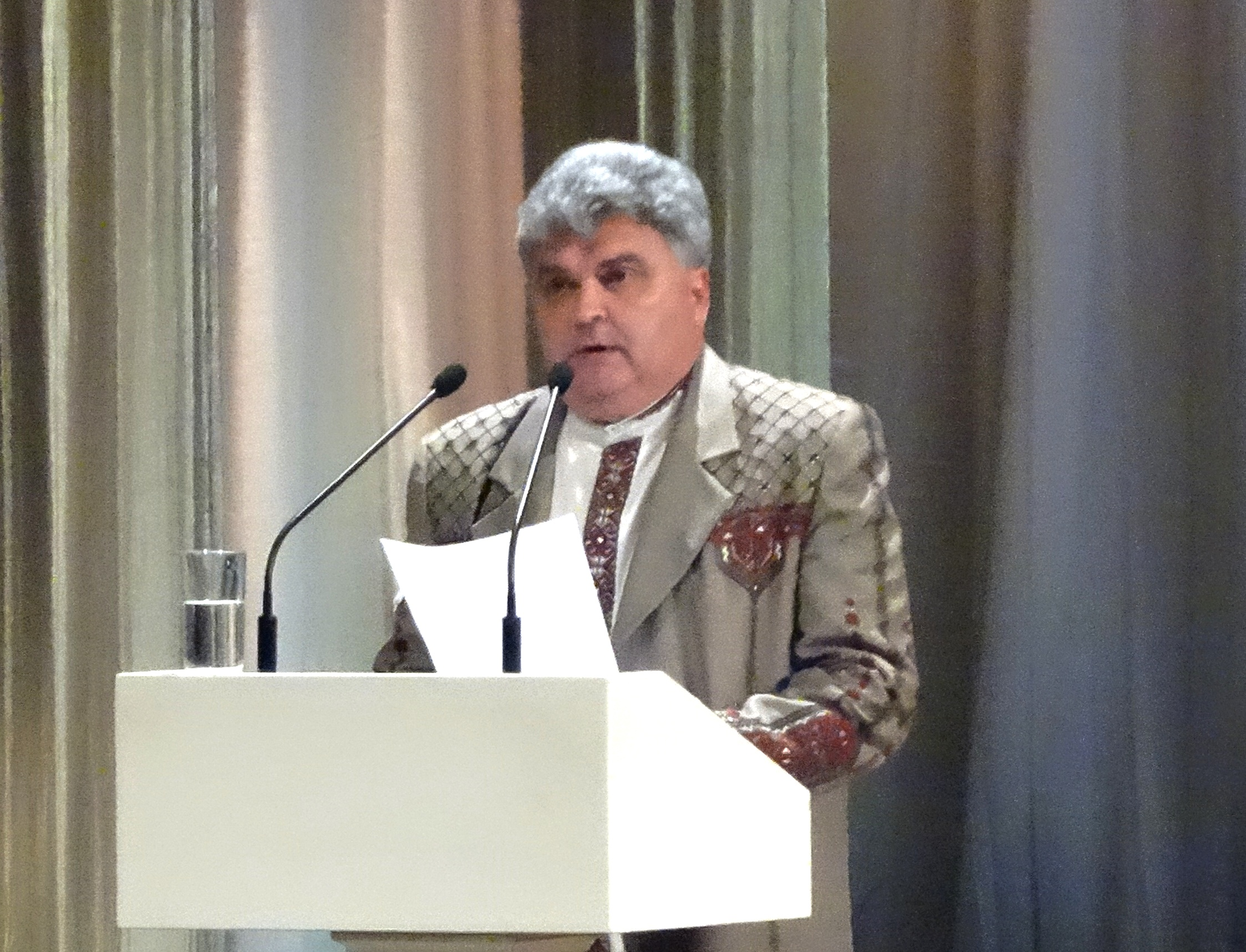 Петр Тултаев - мэр города Саранска (Республика Мордовия)